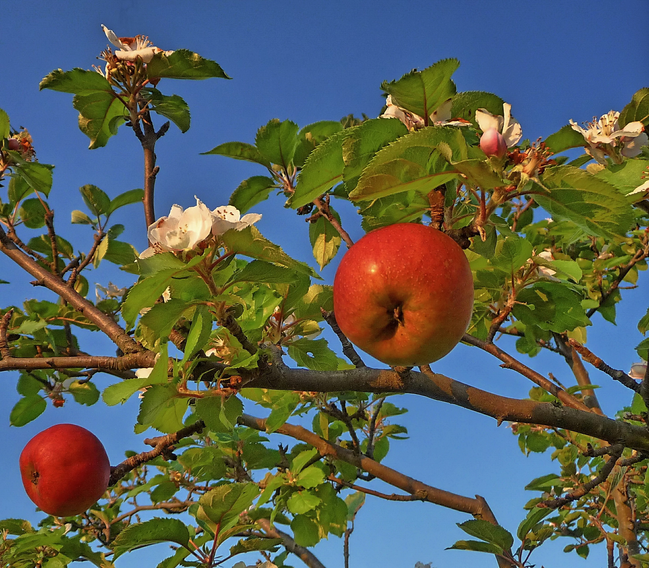 Blüte und Frucht des Apfelbaums gleichzeitig.